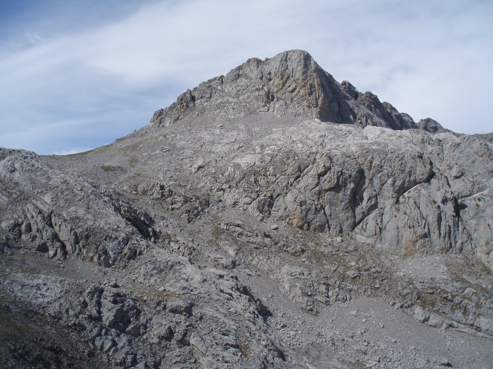 Pico Valdominguero, en el macizo oriental de los Picos de Europa (Cantabria, España)